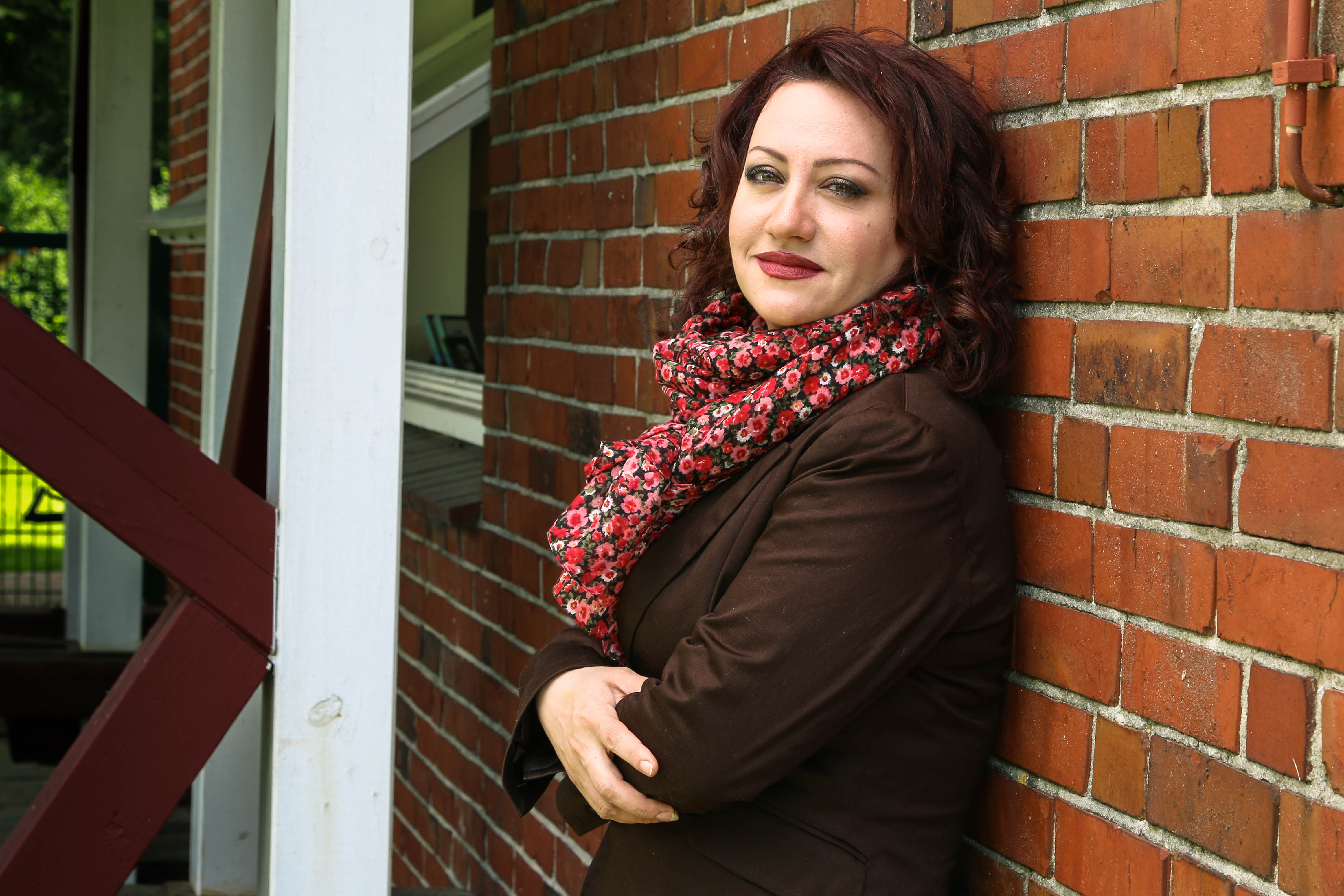 الكاتبة الروائية السورية